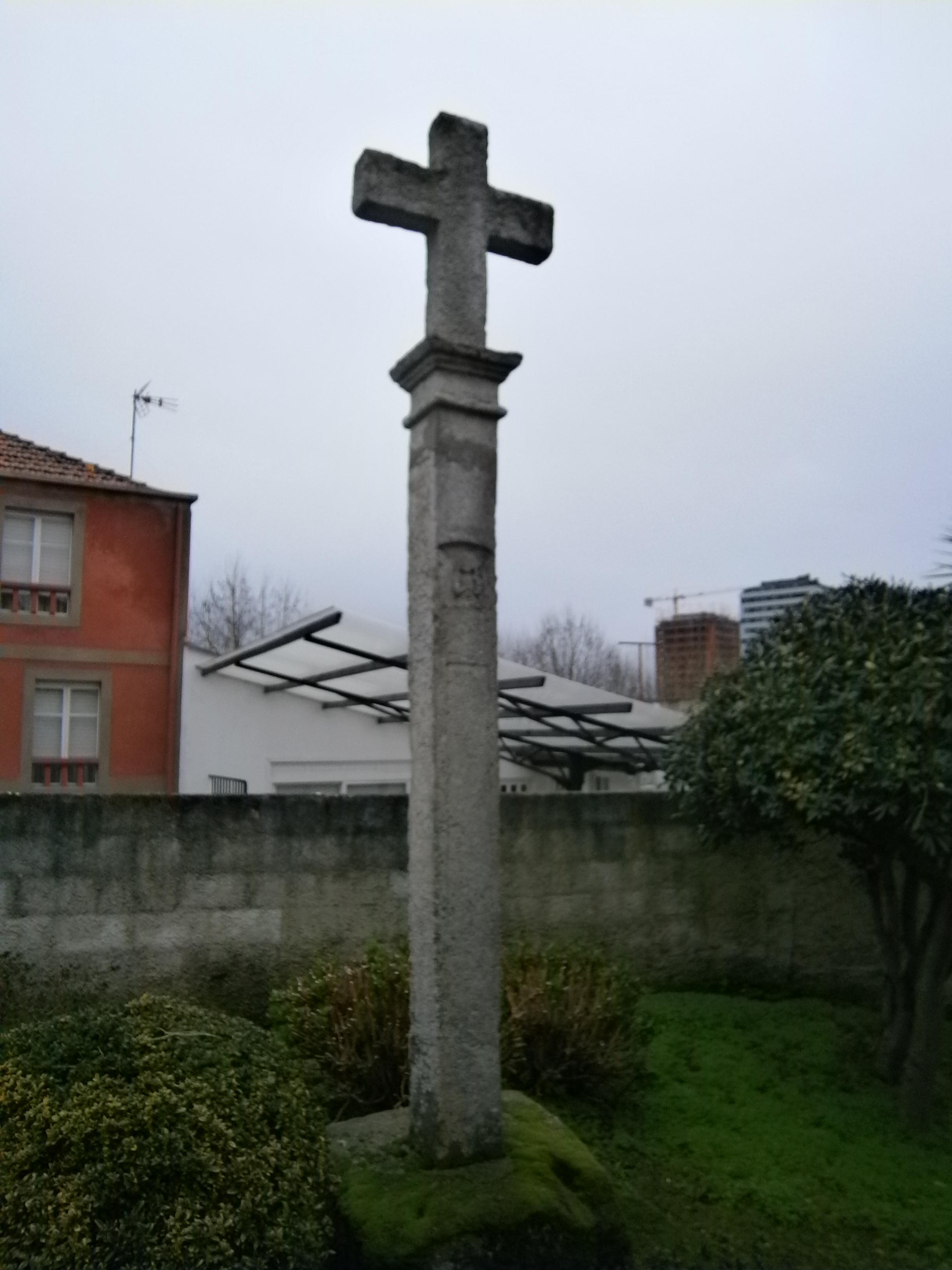 Cruceiro de Carracedo, trasladado a Elviña (A Coruña)